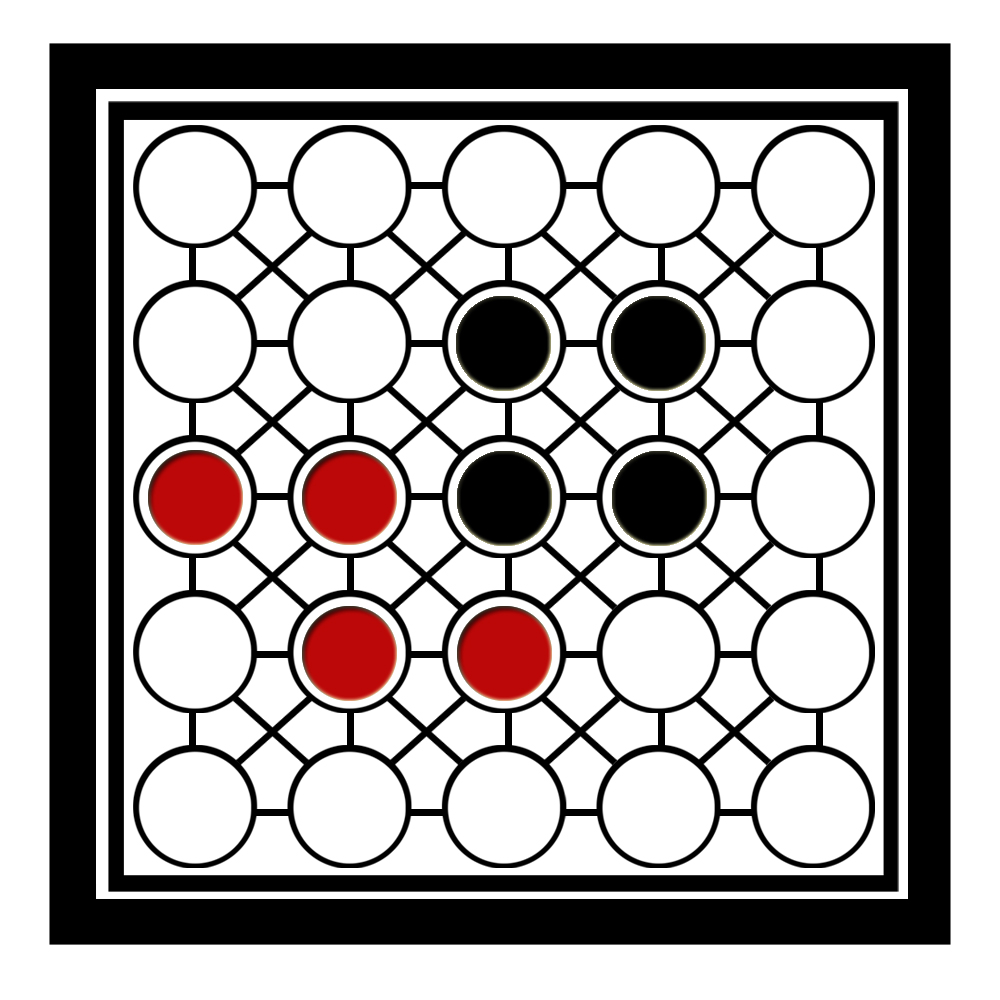 Teeko game board